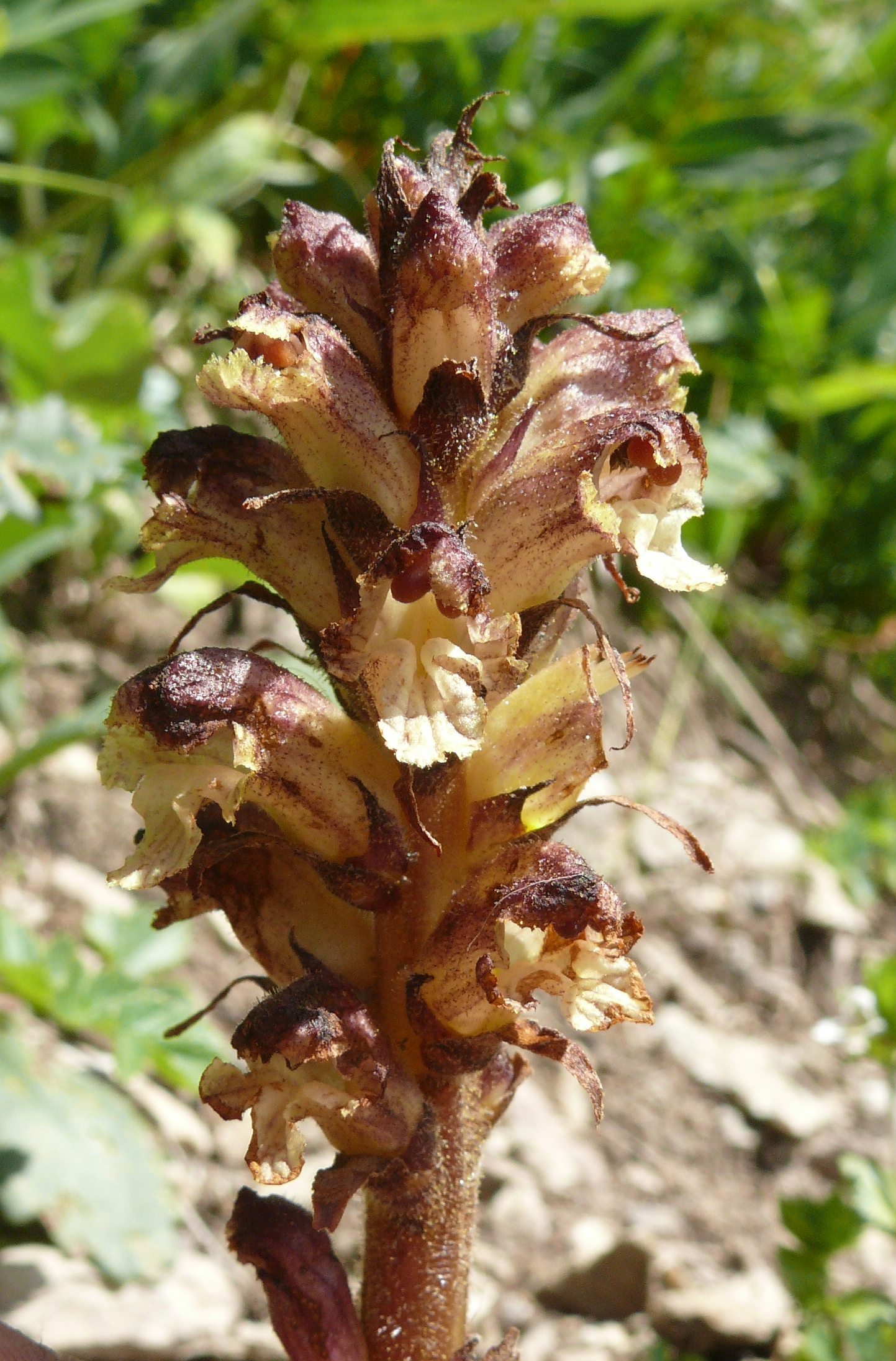 Orobanche reticulata, Allgäuer Alpen, Deutschland